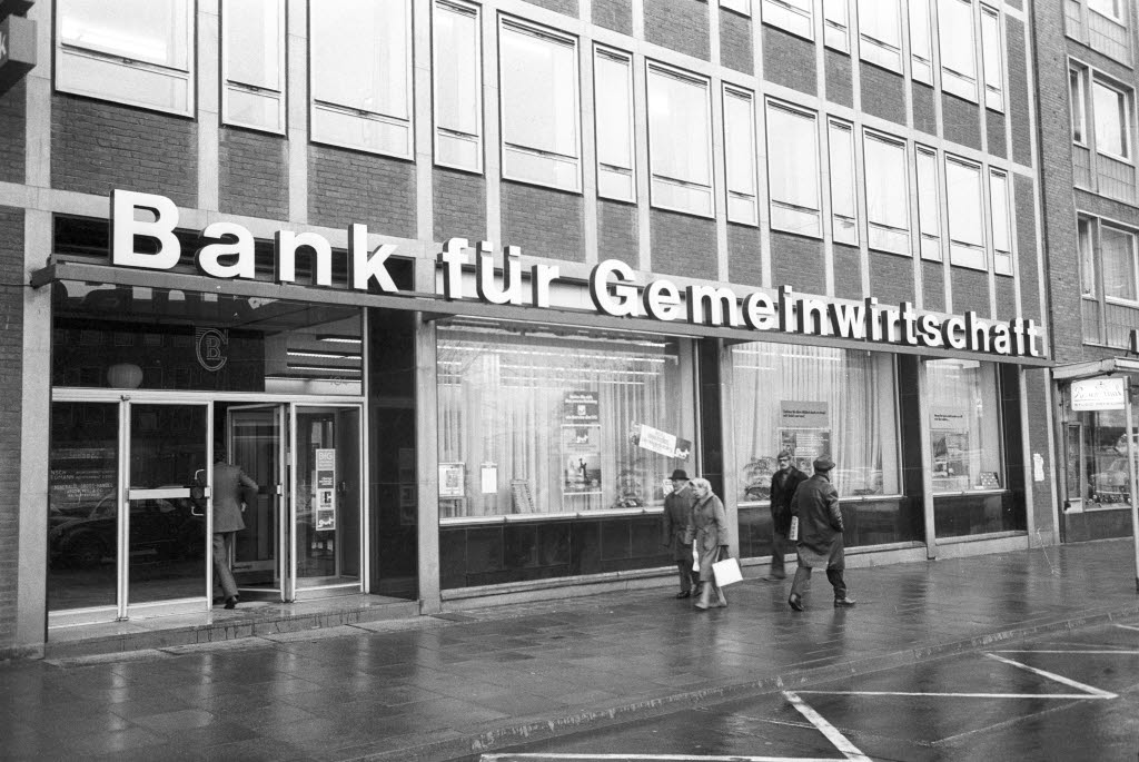 Bank für Gemeinwirtschaft AG an der Holstenstraße 104